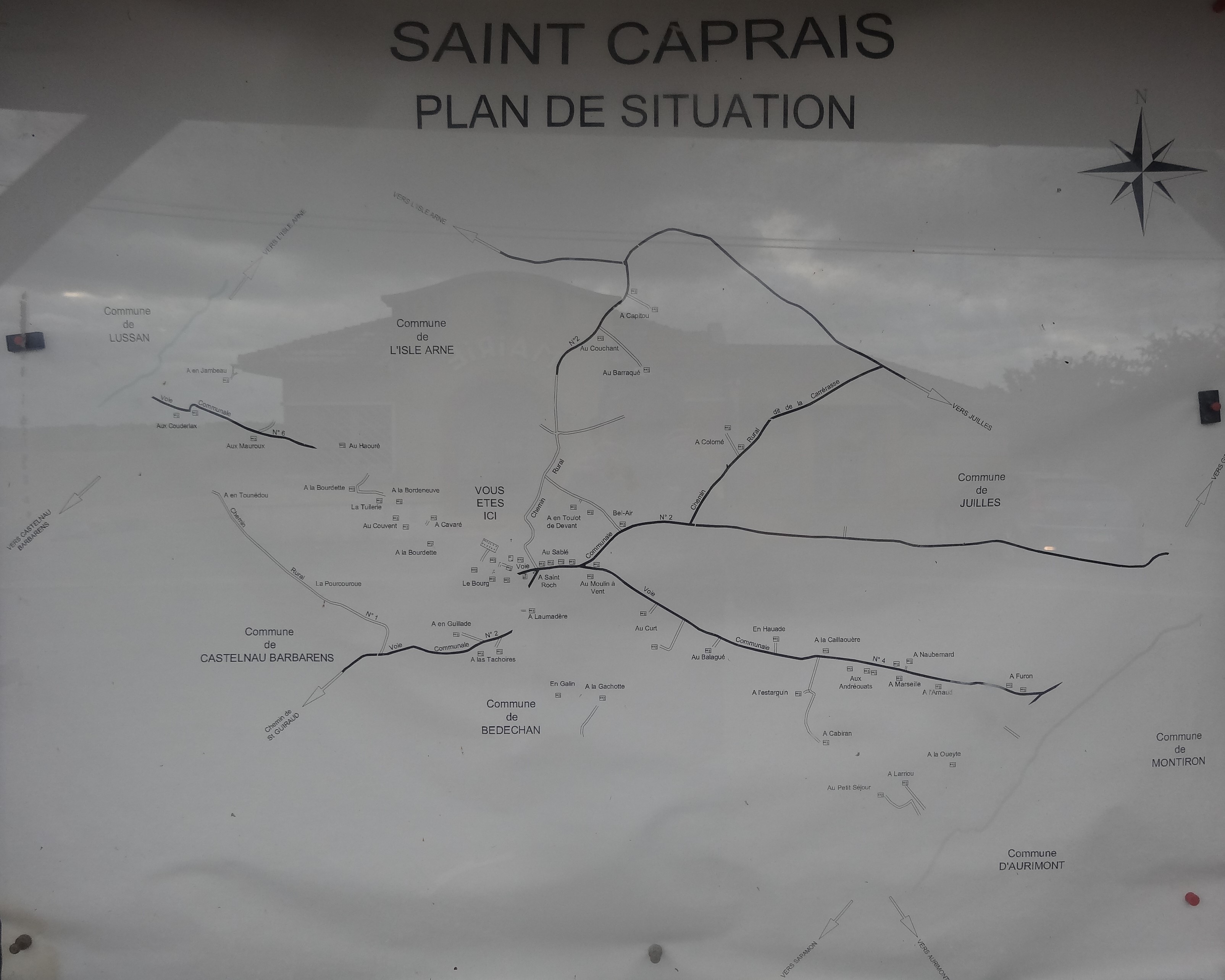 Carte de Saint-Caprais dans le Gers.